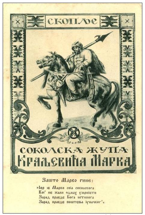 Картичка на Соколската организация „Кралевич Марко“.